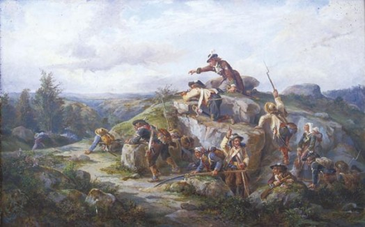 Tableau illustrant l'attaque la Poudrerie de Pont-de-Buis par des Chouans le 17 juin 1795